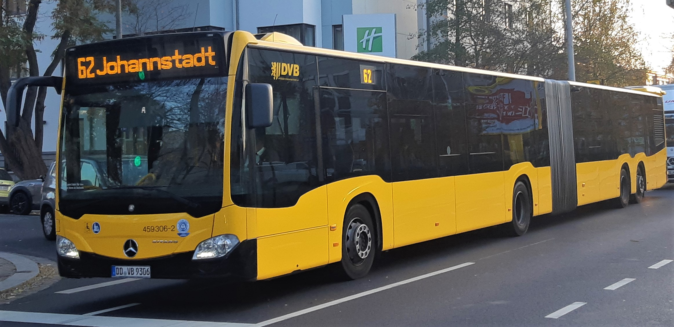 Mercedes Benz Capacity L bei einer Linienfahrt der DVB-Linie 62 Richtung Johannstadt an der Haltestelle Bamberger Straße